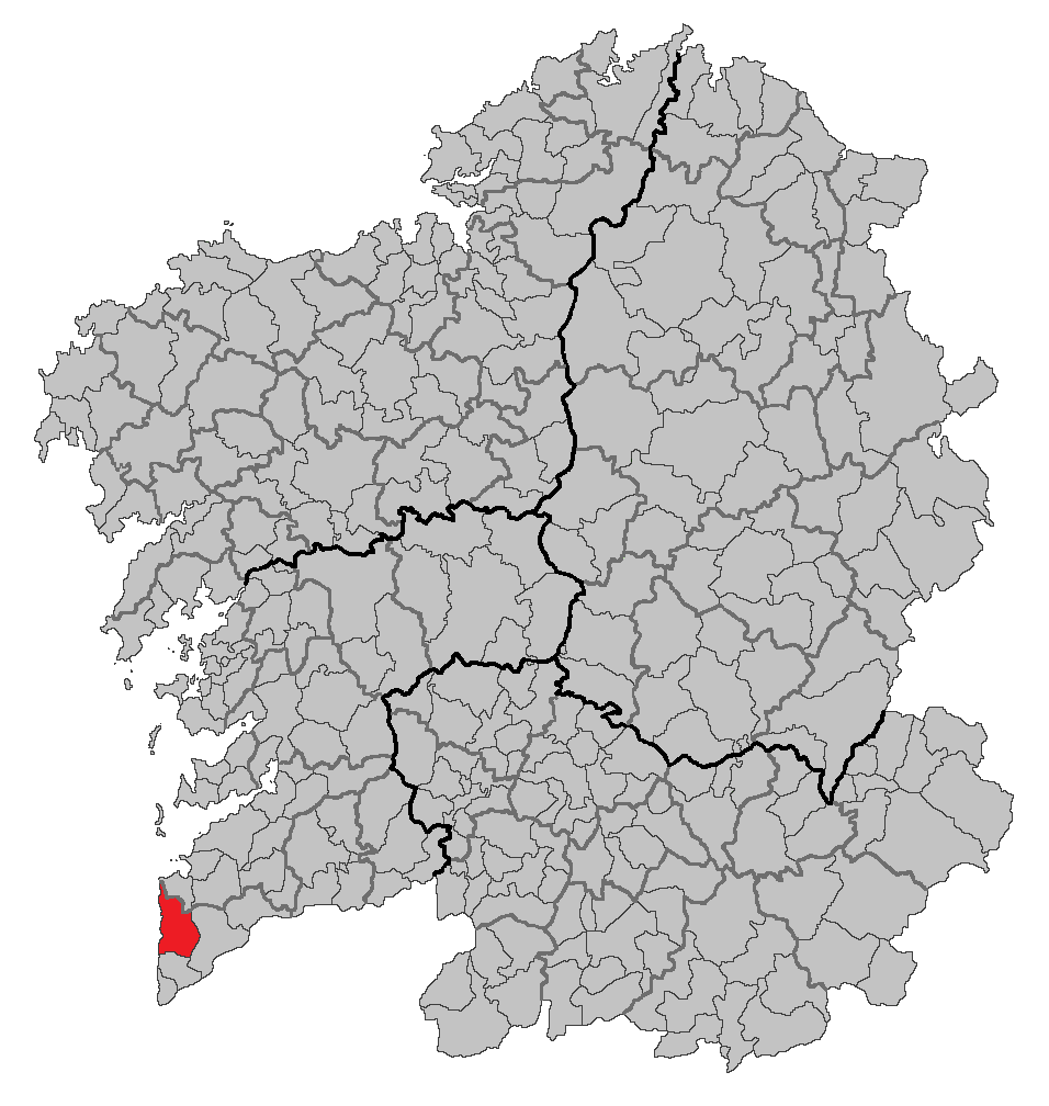 Mapa coa localización do concello de Oia.